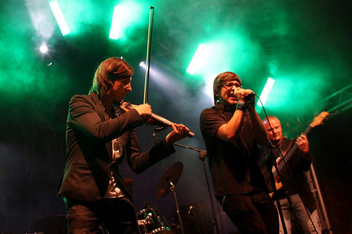 Koncert premierowy pierwszej płyty zespołu Forbidden Souls